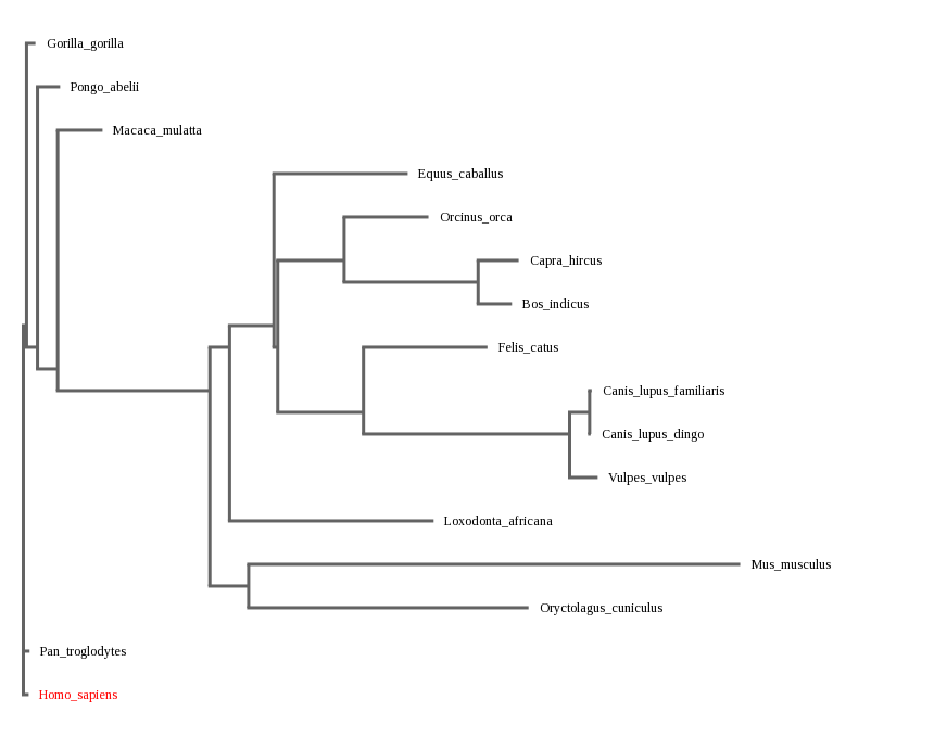 En este árbol filogenético se comparan algunos ortólogos y el humano utilizando el gen CA XIV. Se puso como raíz al humano para poder ver mejor la relación filogenética de este con los organismos ortólogos que se muestran en la imágen. Se realizó con ayuda del programa DNASubway, línea azul.